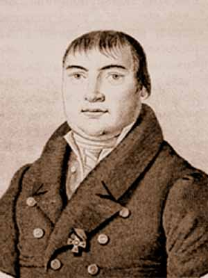 Мерзляков, Алексей Фёдорович